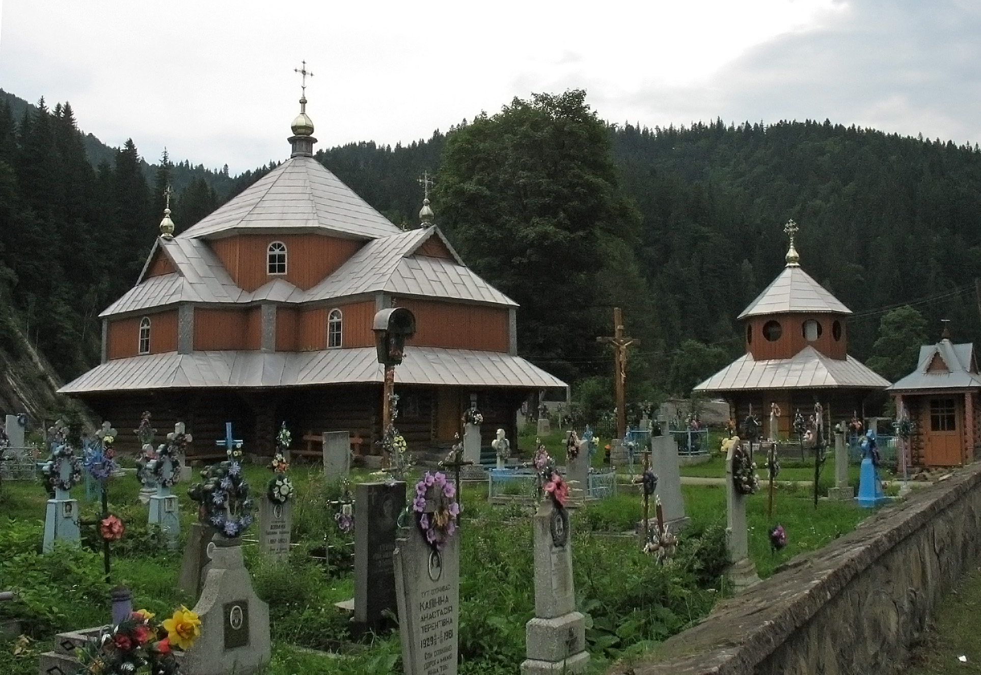 Церква св. Дмитрія в Татарові